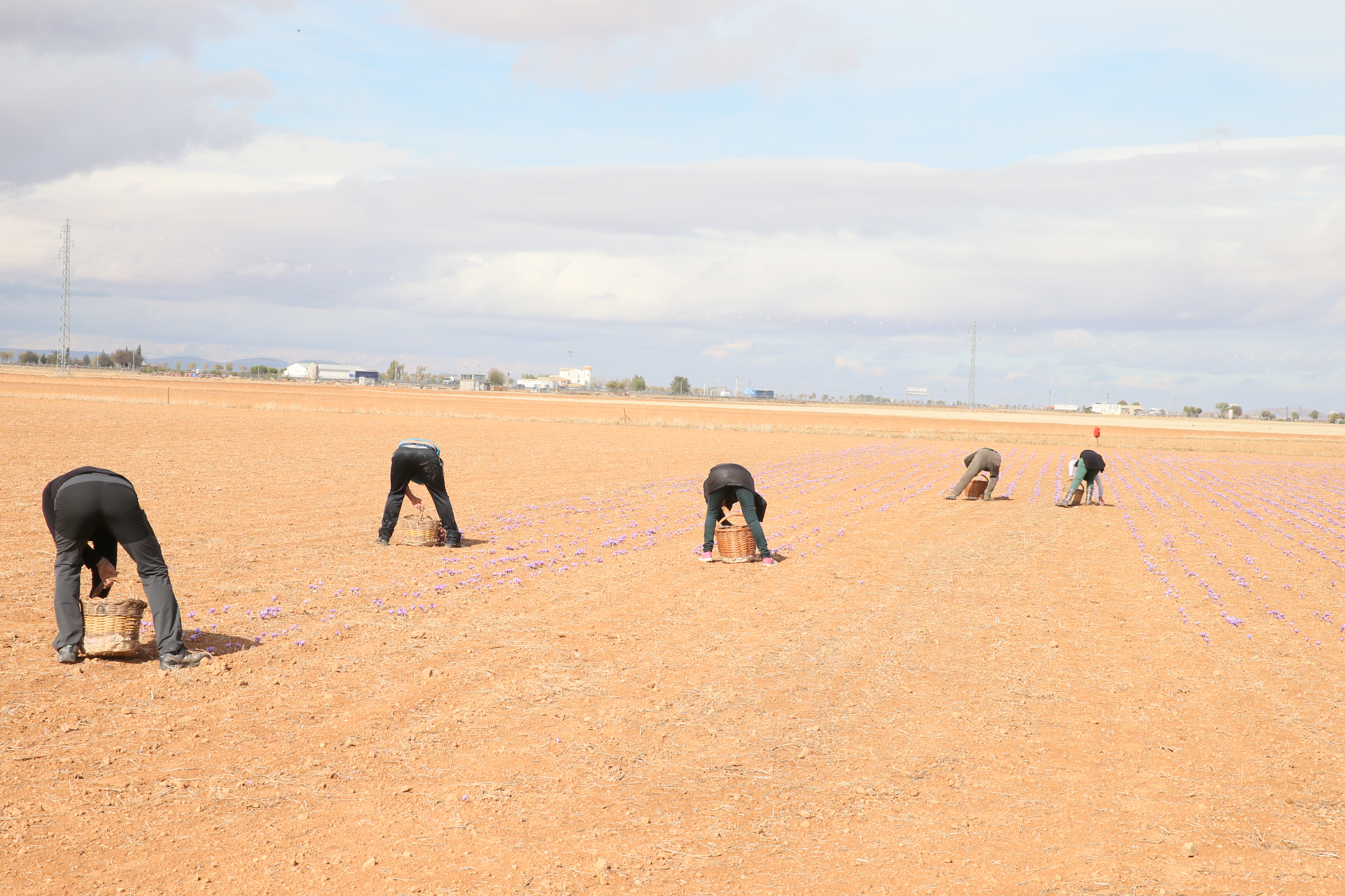 MADRIDEJOS (Toledo), 3 de noviembre de 2017.- El consejero de Agricultura, Medio Ambiente y Desarrollo Rural, Francisco Martínez Arroyo, asiste, en la localidad de Madridejos, a la recogida de la rosa del azafrán en el campo. (Fotos: Ignacio López // JCCM)